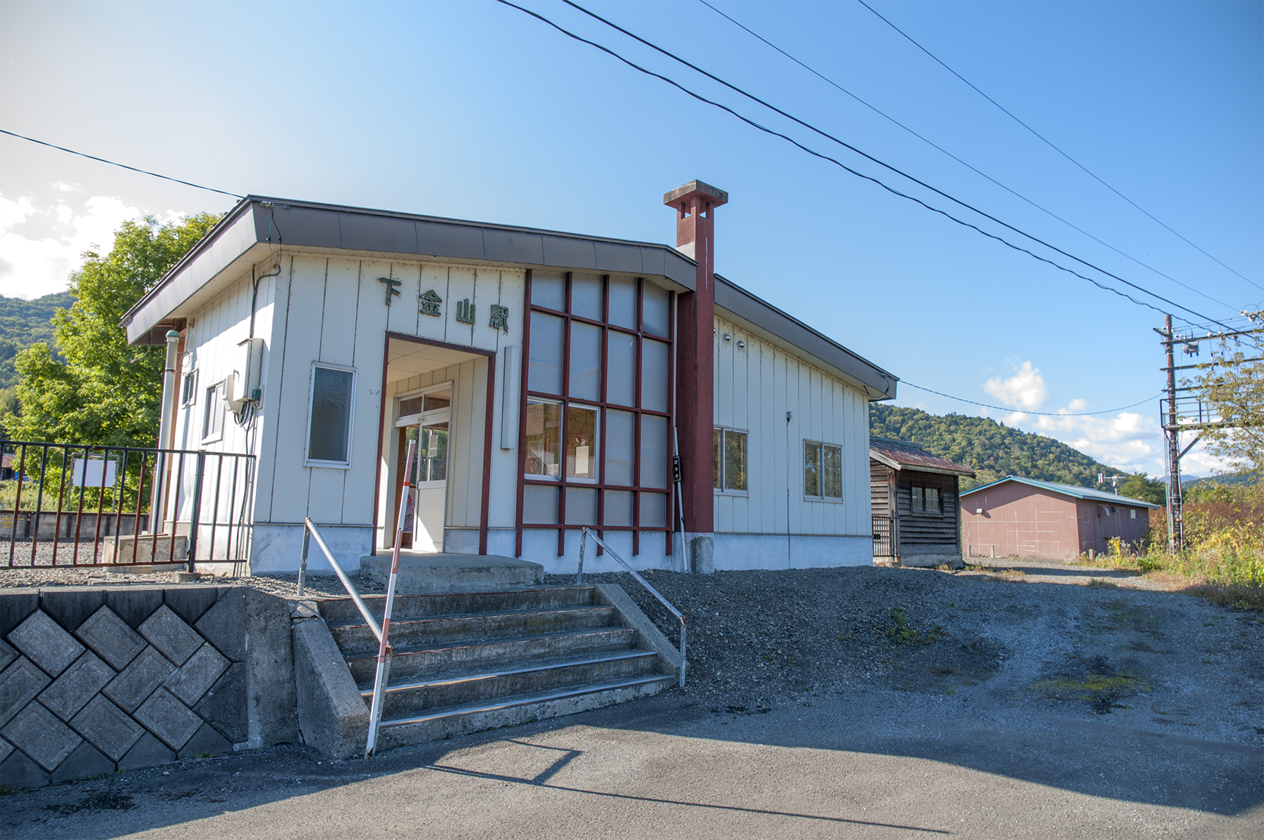 北海道旅客鉄道株式会社根室本線下金山駅